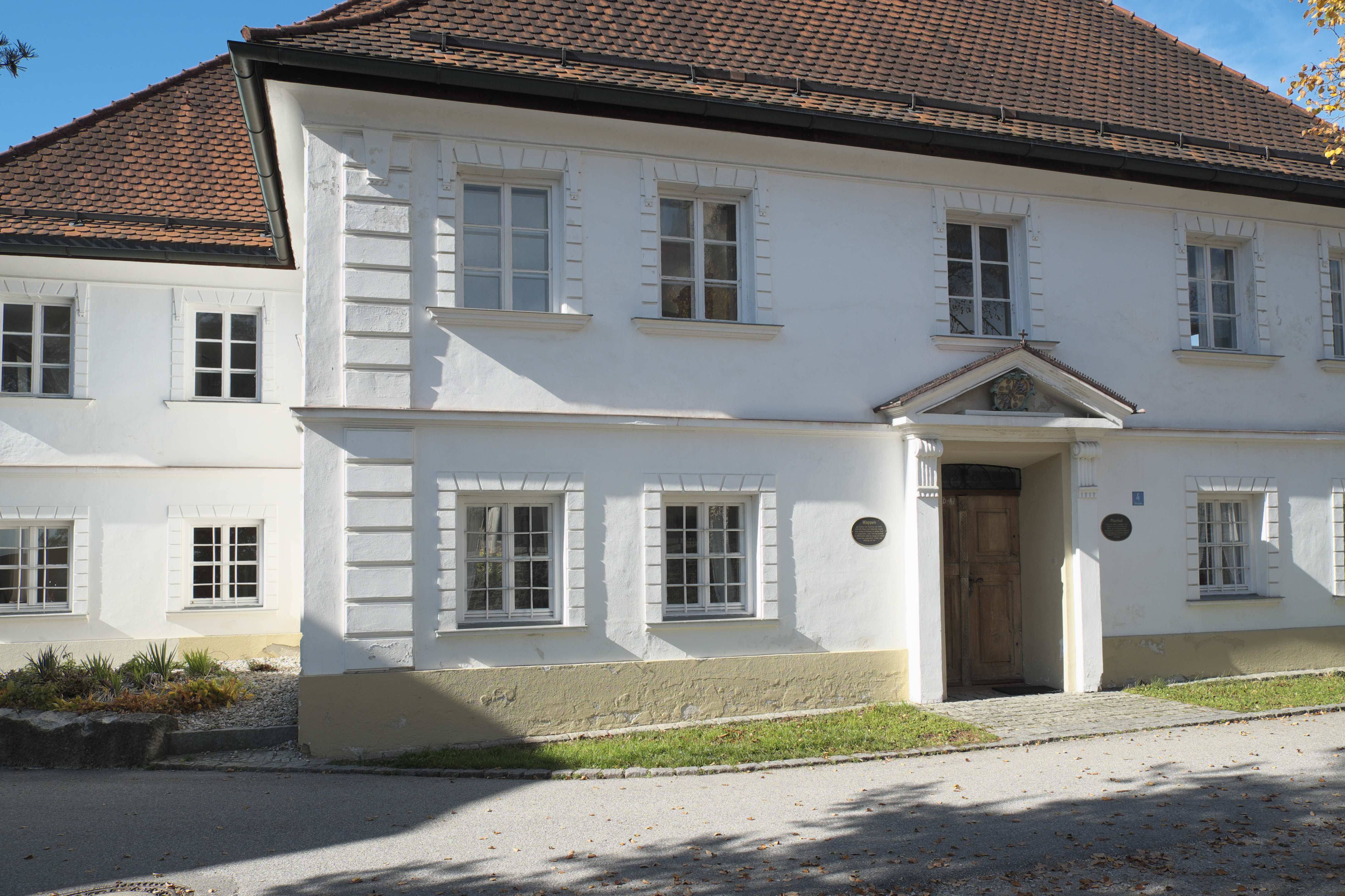 Amtshaus in Tengling (Taching am See) im Landkreis Traunstein (Bayern/Deutschland)